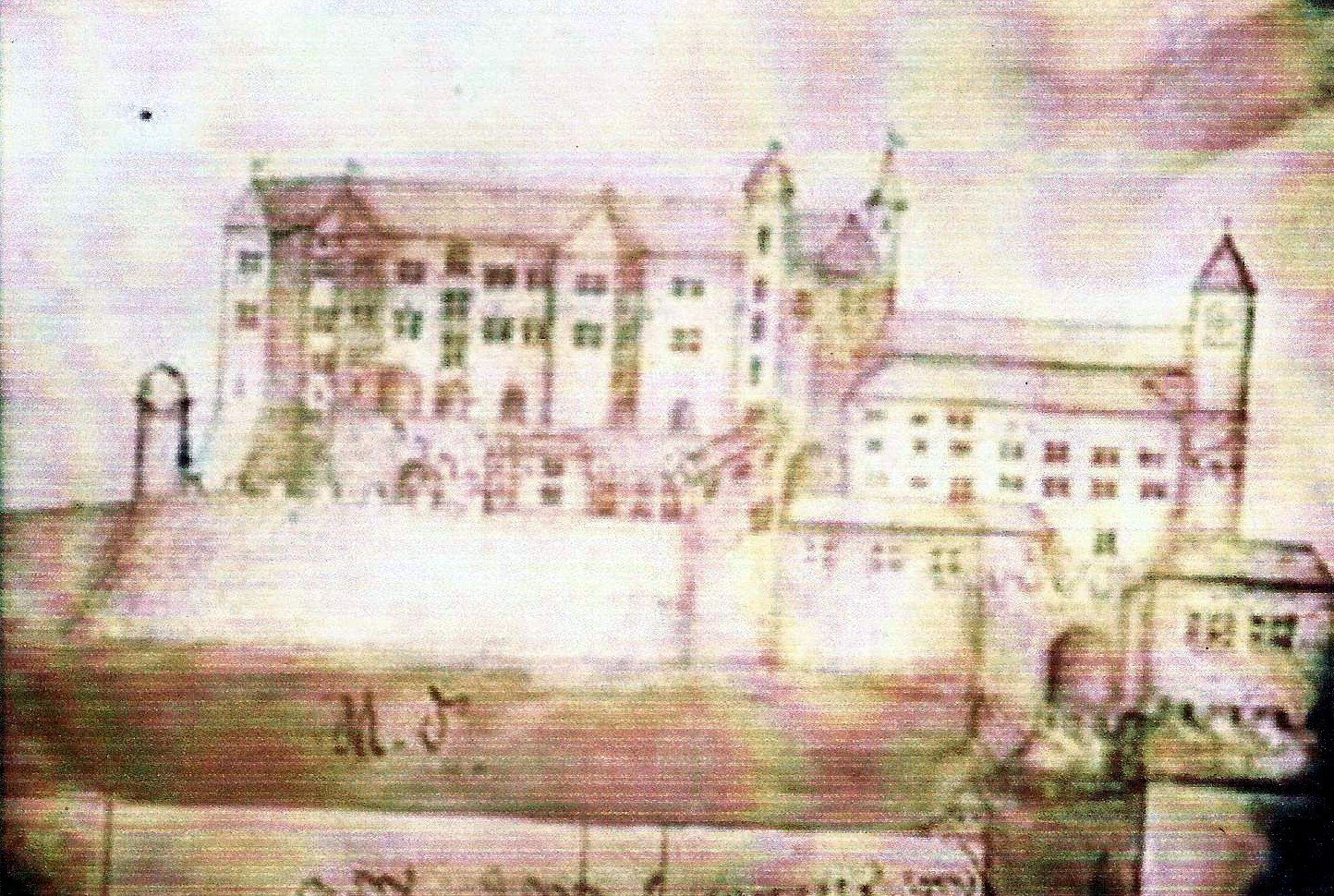 Photod'une photographie prise par Louis de Montravel d'undessin d'époque.